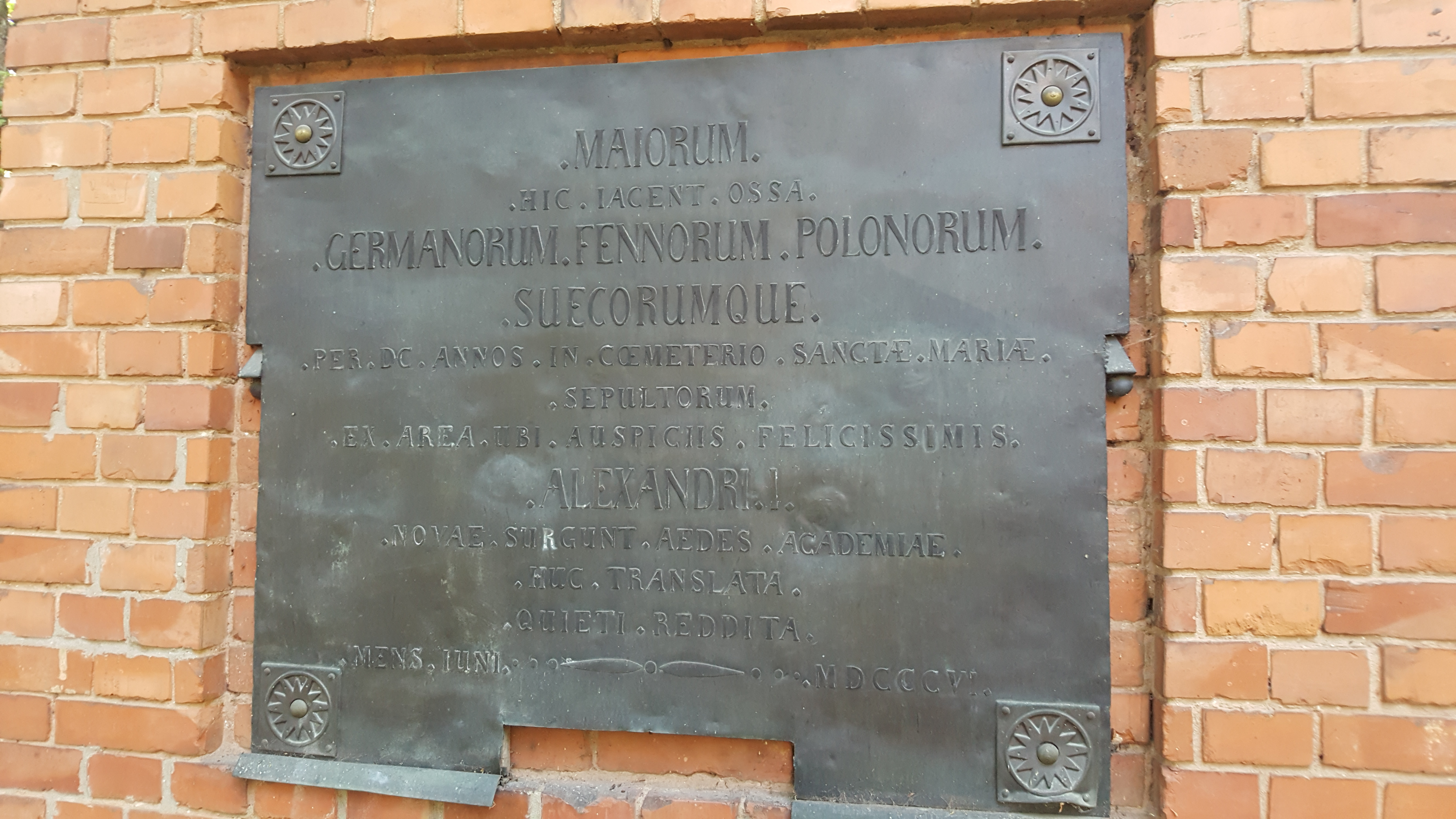 Tablica Rahvaste mälestussammas w języku łacińskim.